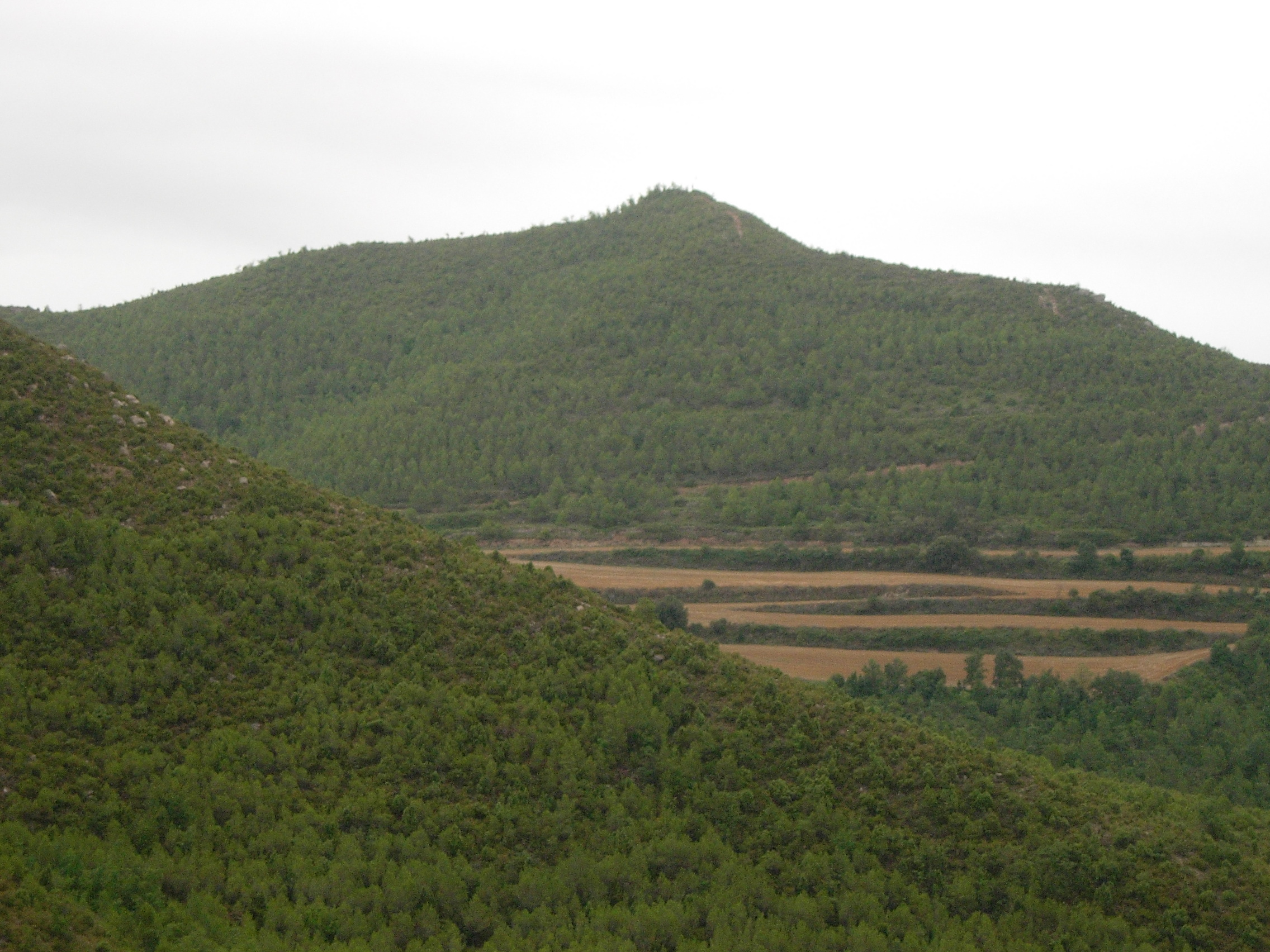 It's de natural forest of Rubió (Catalonia)